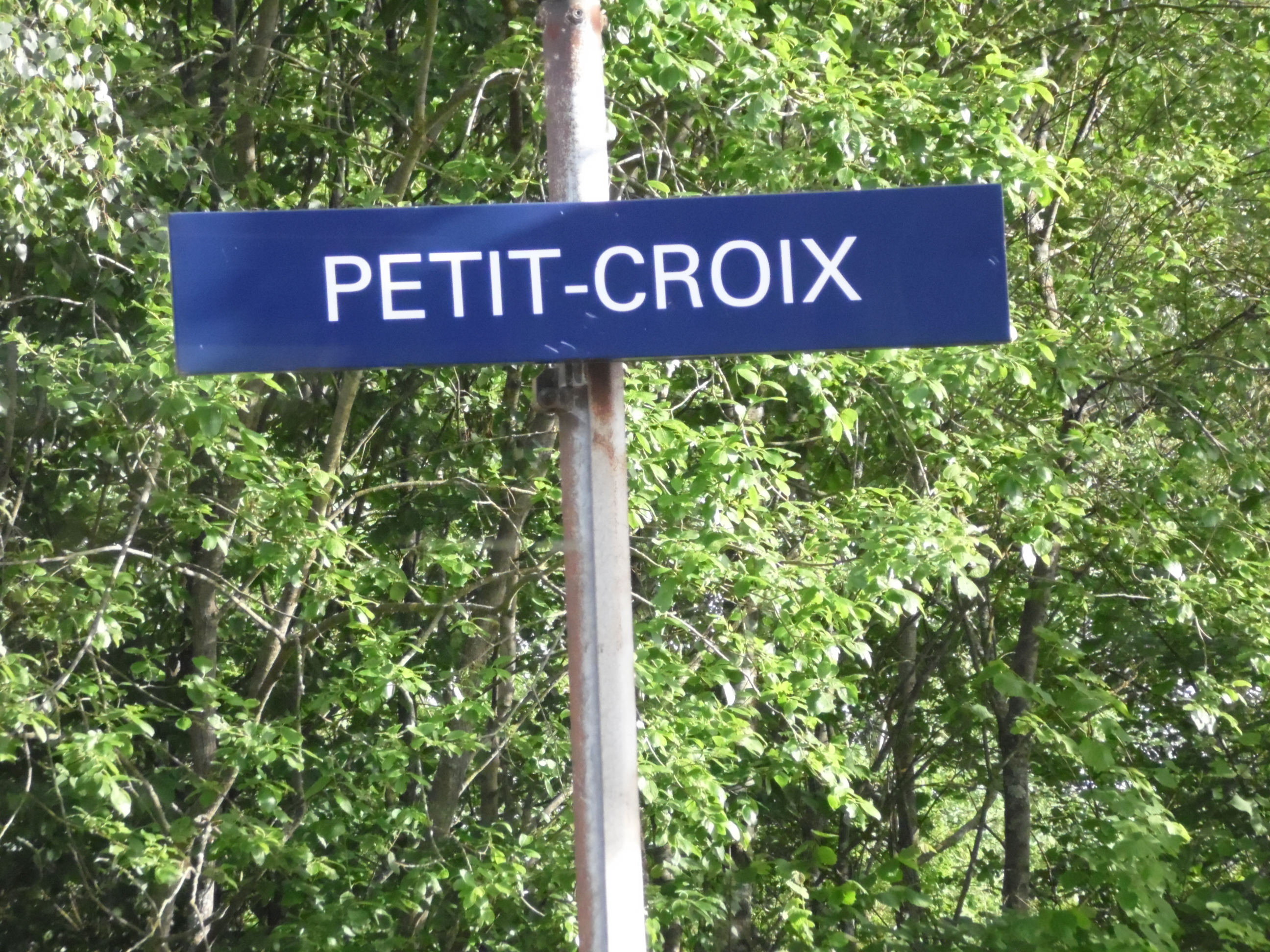 Panneau de la gare de Petit-Croix, le 7 juin 2014.